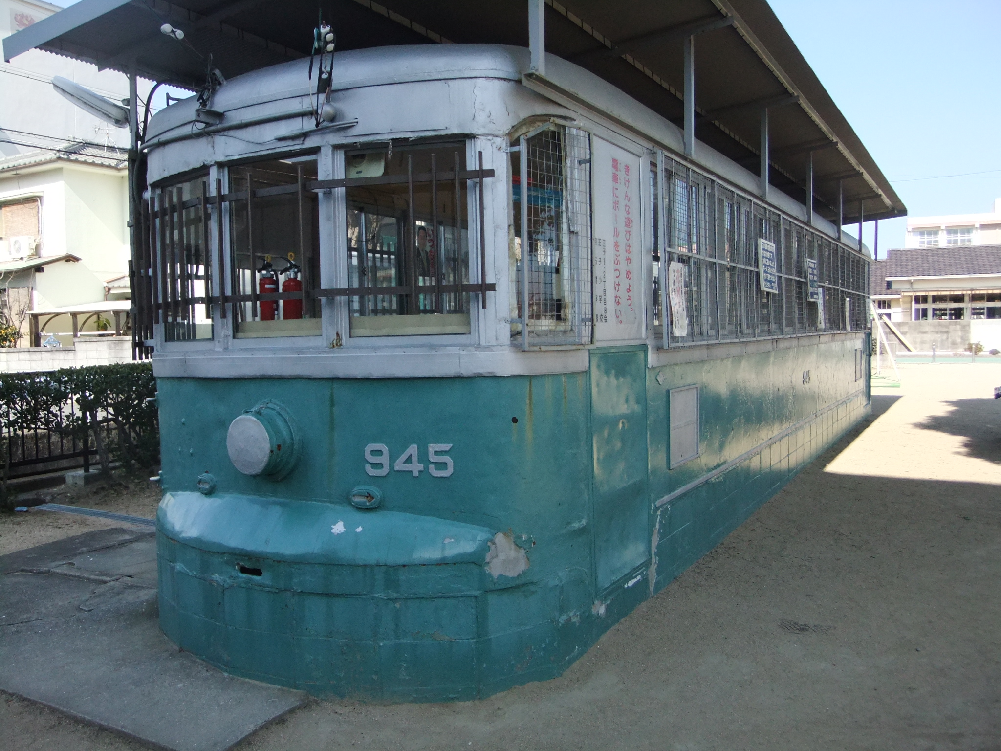 神戸市電945の車体を利用した集会所 明石市王子町